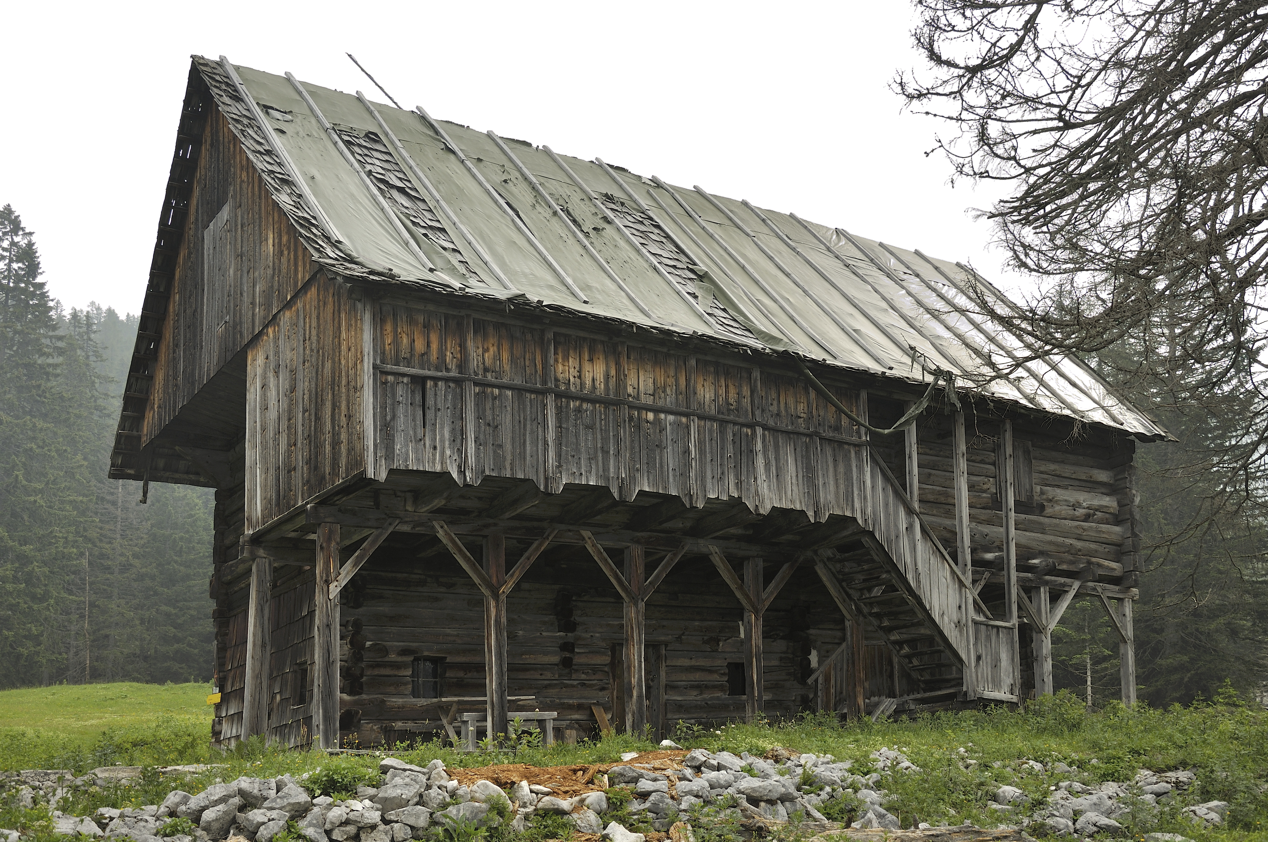 Jagdhütte Bärnriedlau samt Ausstattung und Einrichtung Stand 2012. In den Jahren 2012 bis 2014 wurde die Hütte mit Schindeln neu eingedeckt und teilweise umgebaut.